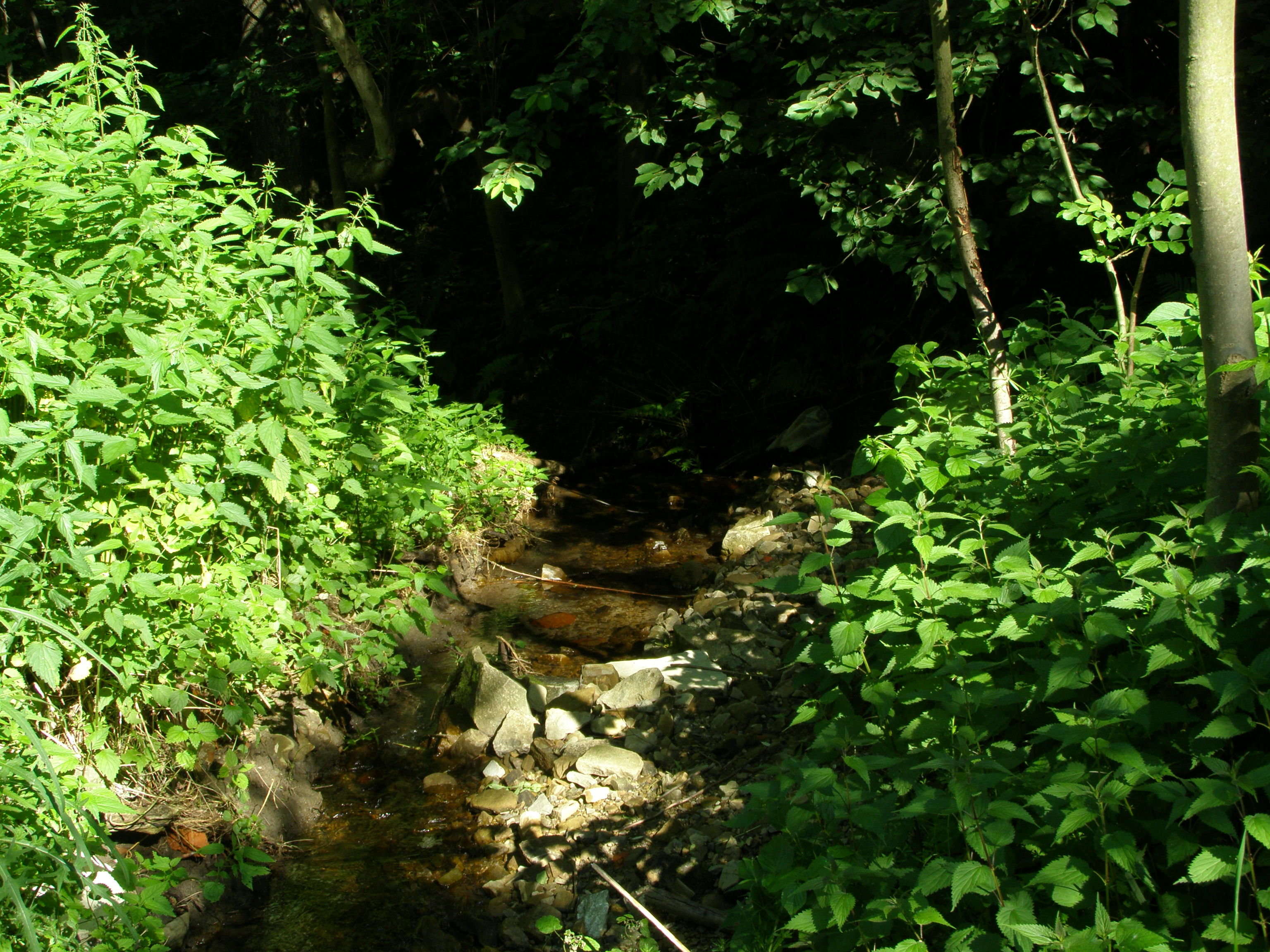 Metylovická pahorkatina, potok Žlabov (levý přítok Olešné)